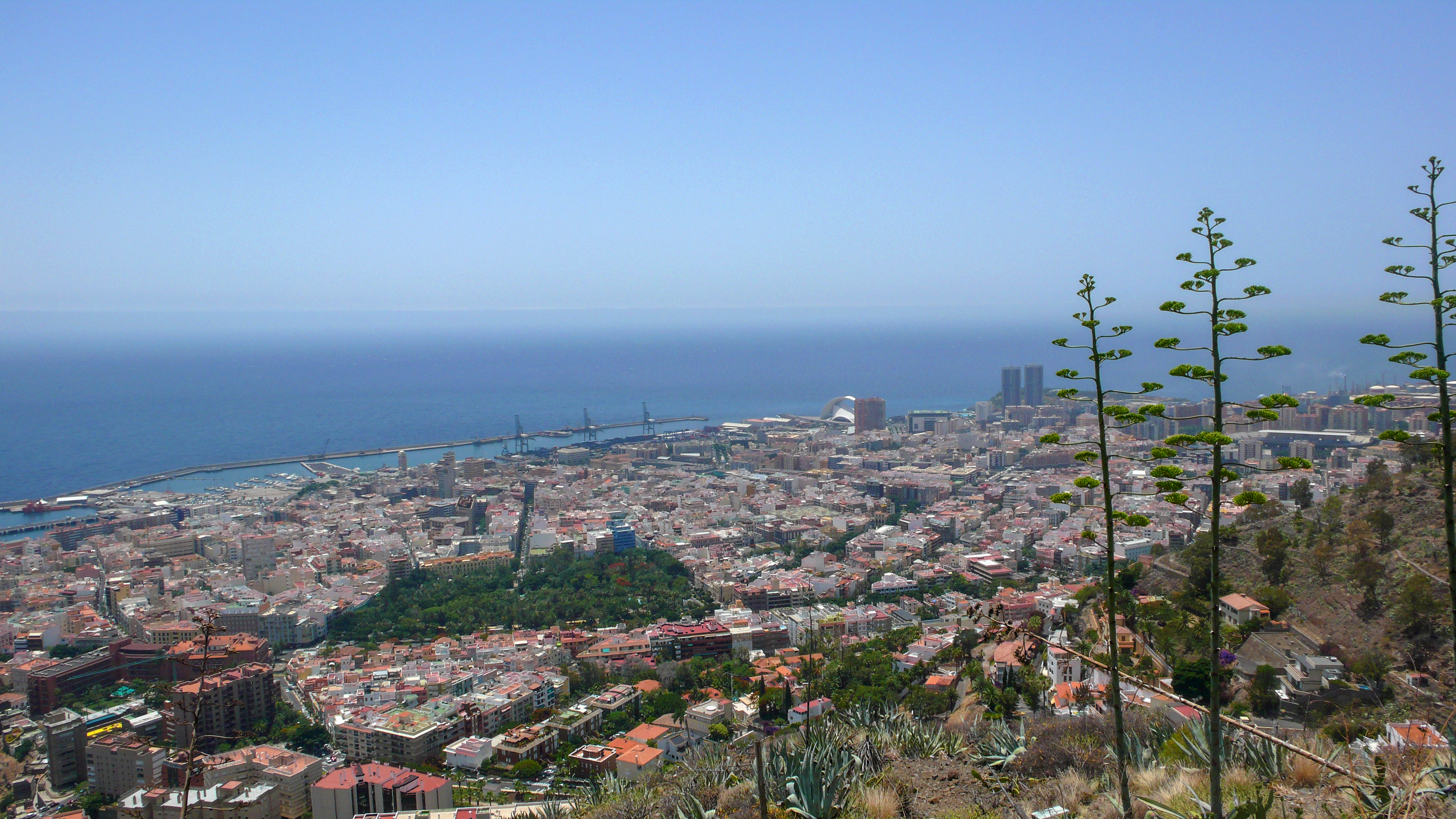 Vista general de Santa Cruz de Tenerife, capital de la provincia Santa Cruz de Tenerife.